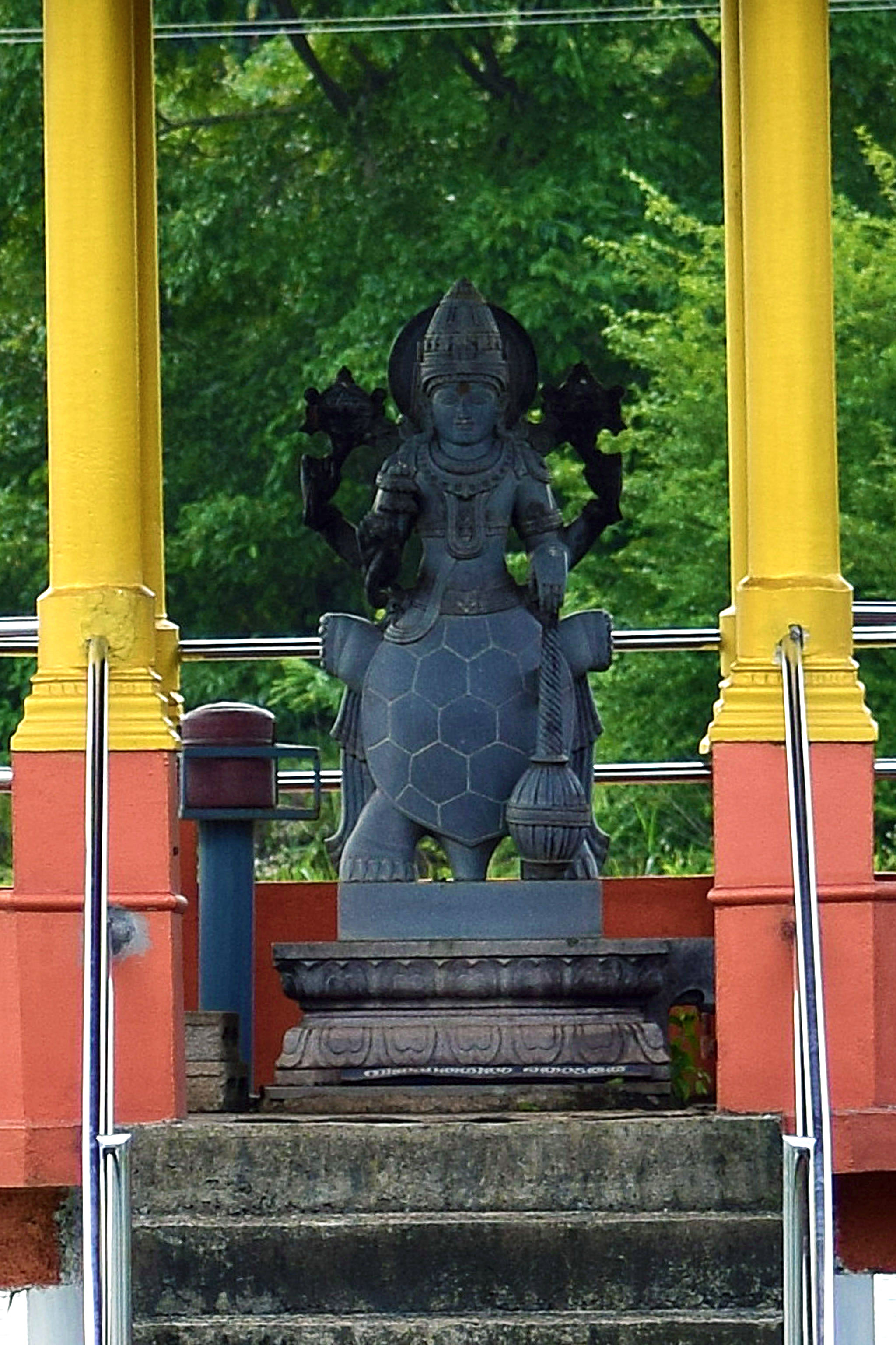 ആമകുളത്തിലെ വിഗ്രഹം